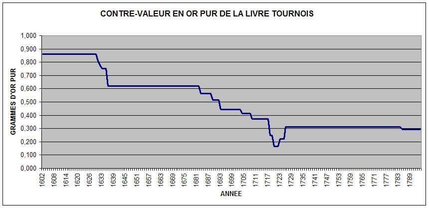 Auteur : Philippe PESCATORE (2006)